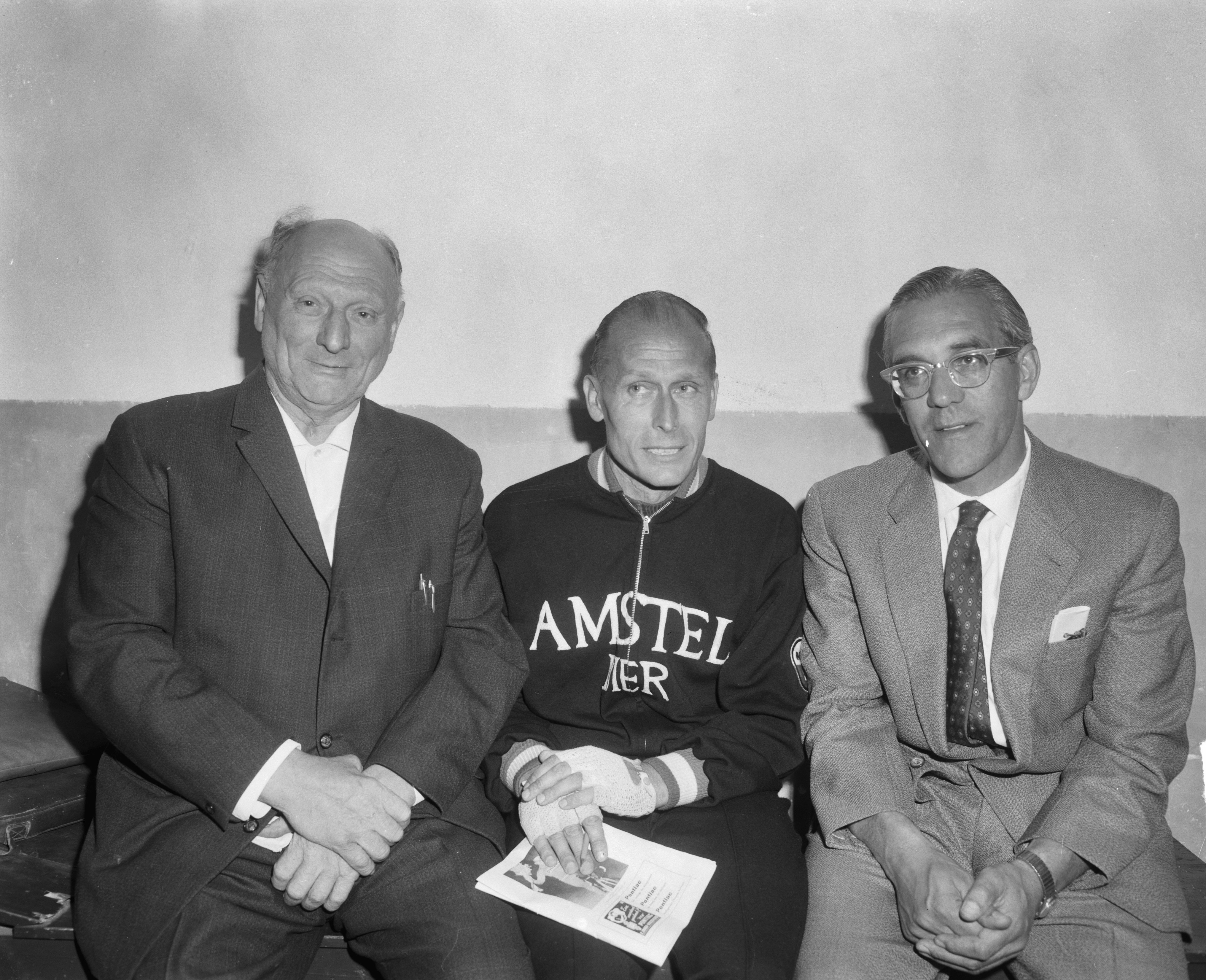 Collectie / Archief : Fotocollectie Anefo Reportage / Serie : [ onbekend ] Beschrijving : Revanches Wereldkampioenschappen wielrennen in Olympisch Stadion . De oude glorie Piet Moeskops, Jan Derksen en Arie van Vliet Datum : 12 augustus 1963 Locatie : Amsterdam, Noord-Holland Trefwoorden : sport, wielrennen Persoonsnaam : Derksen Jan, Moeskops Piet, Vliet Arie Fotograaf : Bilsen, Joop van / Anefo Auteursrechthebbende : Nationaal Archief Materiaalsoort : Negatief (zwart/wit) Nummer archiefinventaris : bekijk toegang 2.24.01.04 Bestanddeelnummer : 915-4491